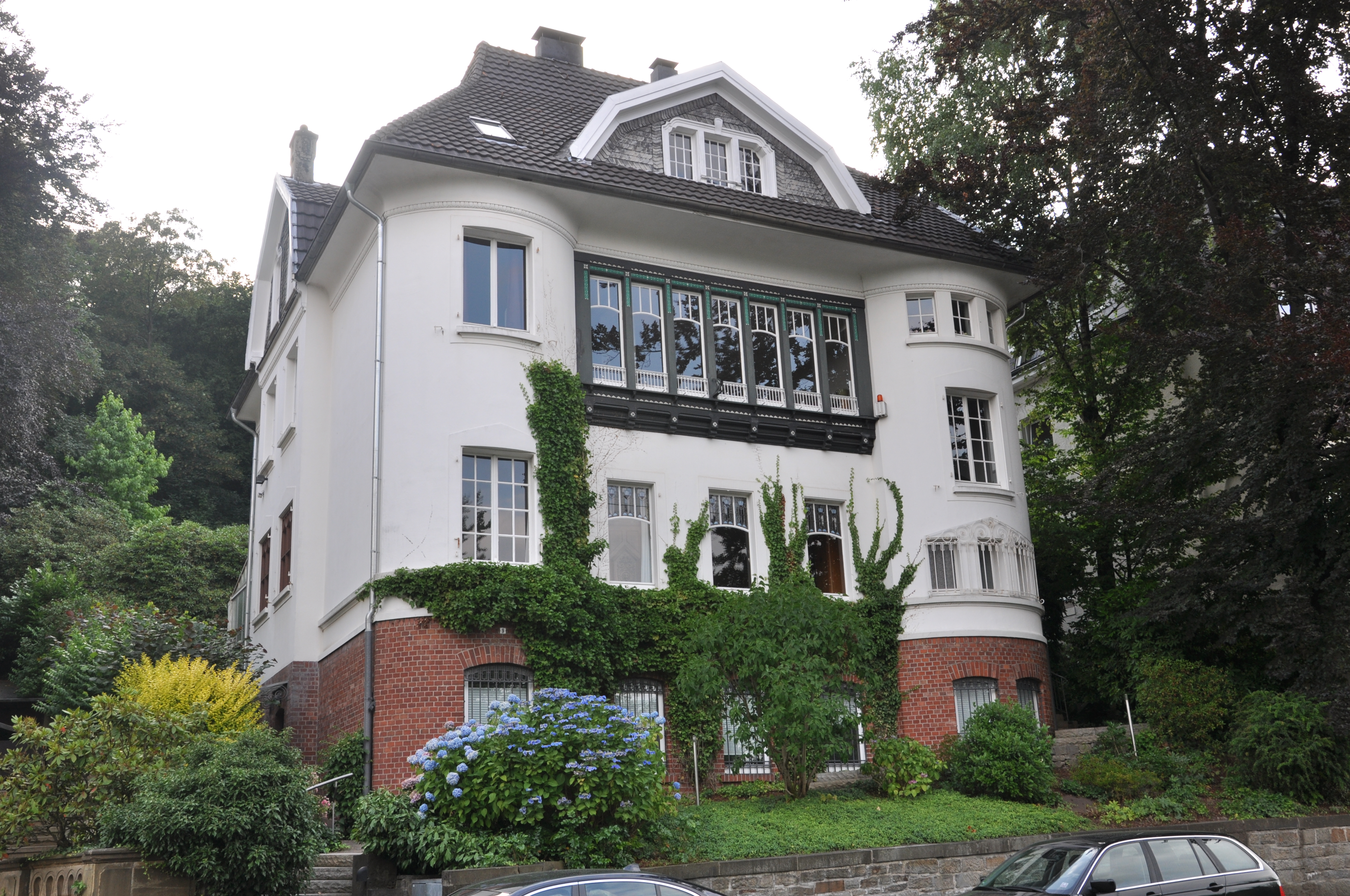 Am Buschhäuschen, Wuppertal